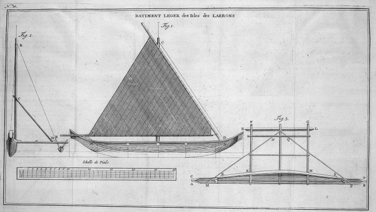 [Illustrations de Voyage autour du monde] Auteur : George Anson Éditeur : Henri-Albert Gosse et Compagnie (Genève) 1750